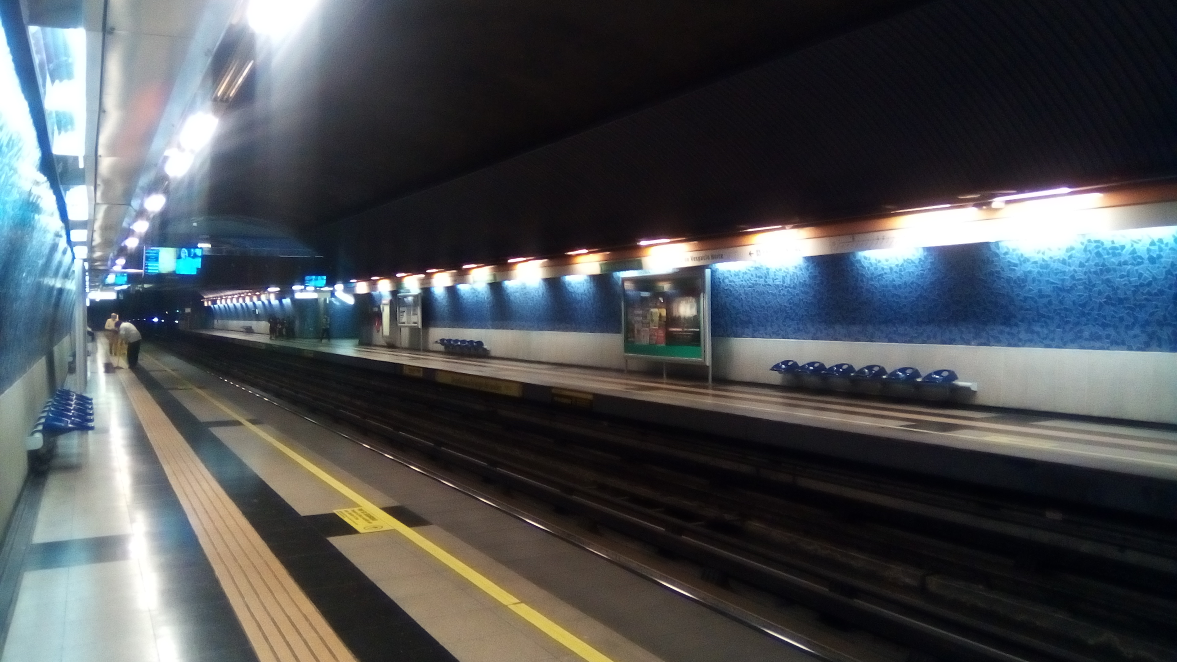 Estación Einstein